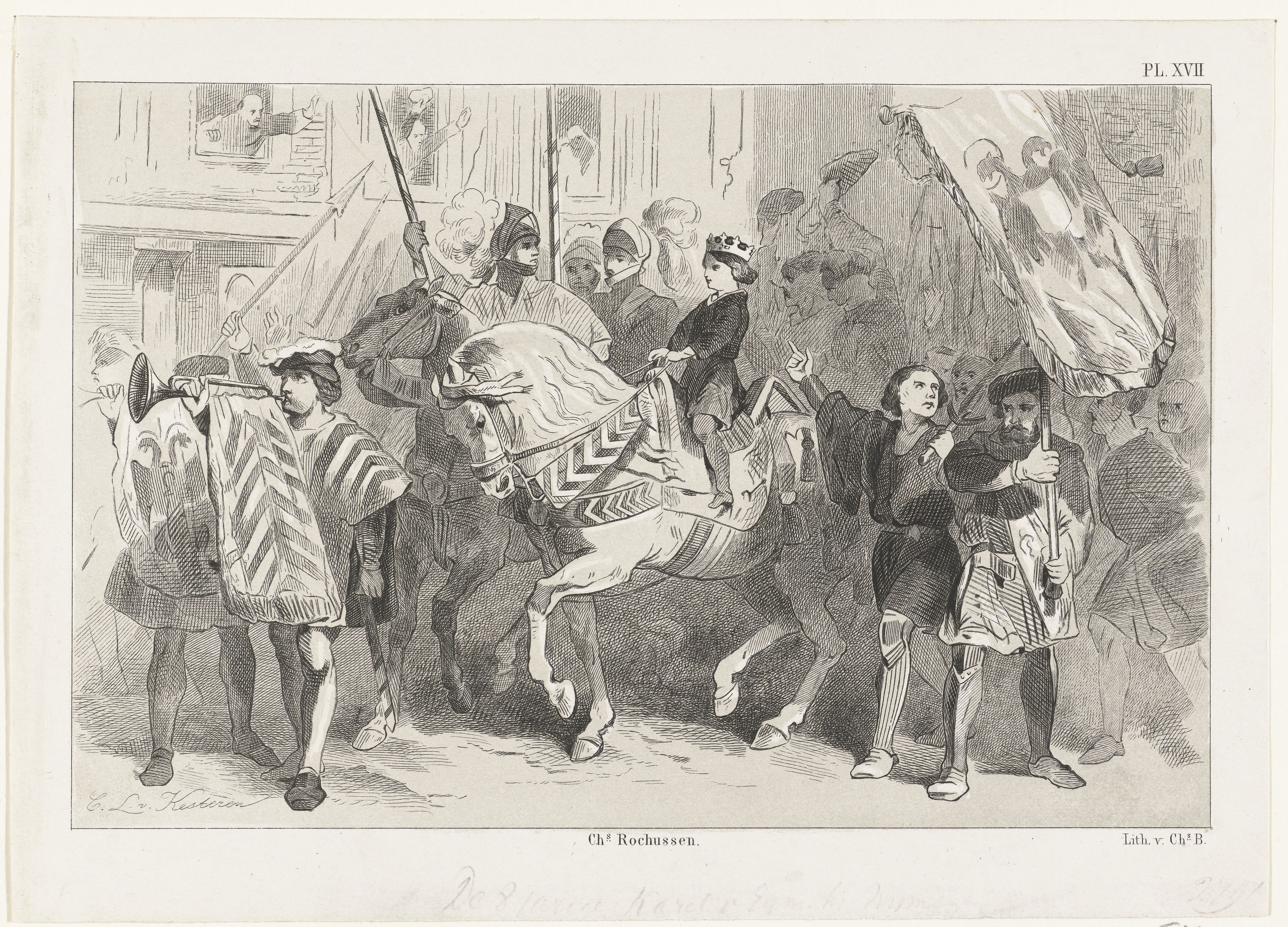 IdentificatieTitel(s): De achtjarige Karel van Egmond door de inwoners van Nijmegen gehuldigd als hertog van Gelre, 1473Objecttype: prent historieprent Objectnummer: RP-P-OB-78.348Catalogusreferentie: FMH 313FMH 19Atlas van Stolk 22Atlas van Stolk 197Omschrijving: De achtjarige Karel van Egmond door de inwoners van Nijmegen gehuldigd als hertog van Gelre en in harnas te paard door de stad gevoerd, 1473.VervaardigingVervaardiger: prentmaker: Christiaan Lodewijk van Kesteren (vermeld op object)naar tekening van: Charles Rochussen (vermeld op object)drukker: Charles Binger (vermeld op object)Plaats vervaardiging: NederlandDatering: 1853 - 1861Fysieke kenmerken: lithografie in zwart met een toonblok in grijsMateriaal: papier Techniek: lithografie (techniek)Afmetingen: papier: h 164 mm × b 230 mmToelichtingIllustratie voor: Jacob van Lennep, De geschiedenis des vaderlands in schetsen en afbeeldingen, Binger, Amsterdam 1855-1861, 8 delen, pl. XVII.OnderwerpWat: Bourgondische tijd in NederlandWanneer: 1473 - 1473Waar: NijmegenWie: Karel van Egmond (hertog van Gelre)Verwerving en rechtenVerwerving: aankoop 1881Copyright: Publiek domein